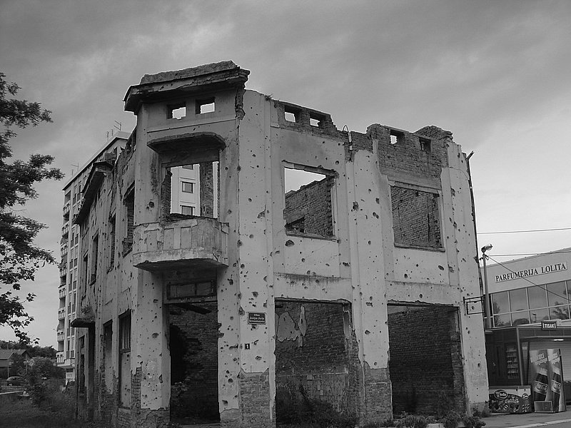 War is bad